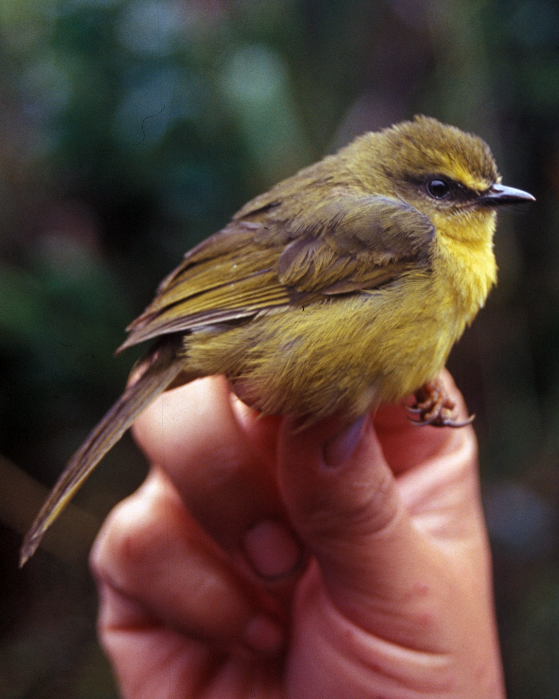 Citrine Warbler (Basileuterus luteoviridis)